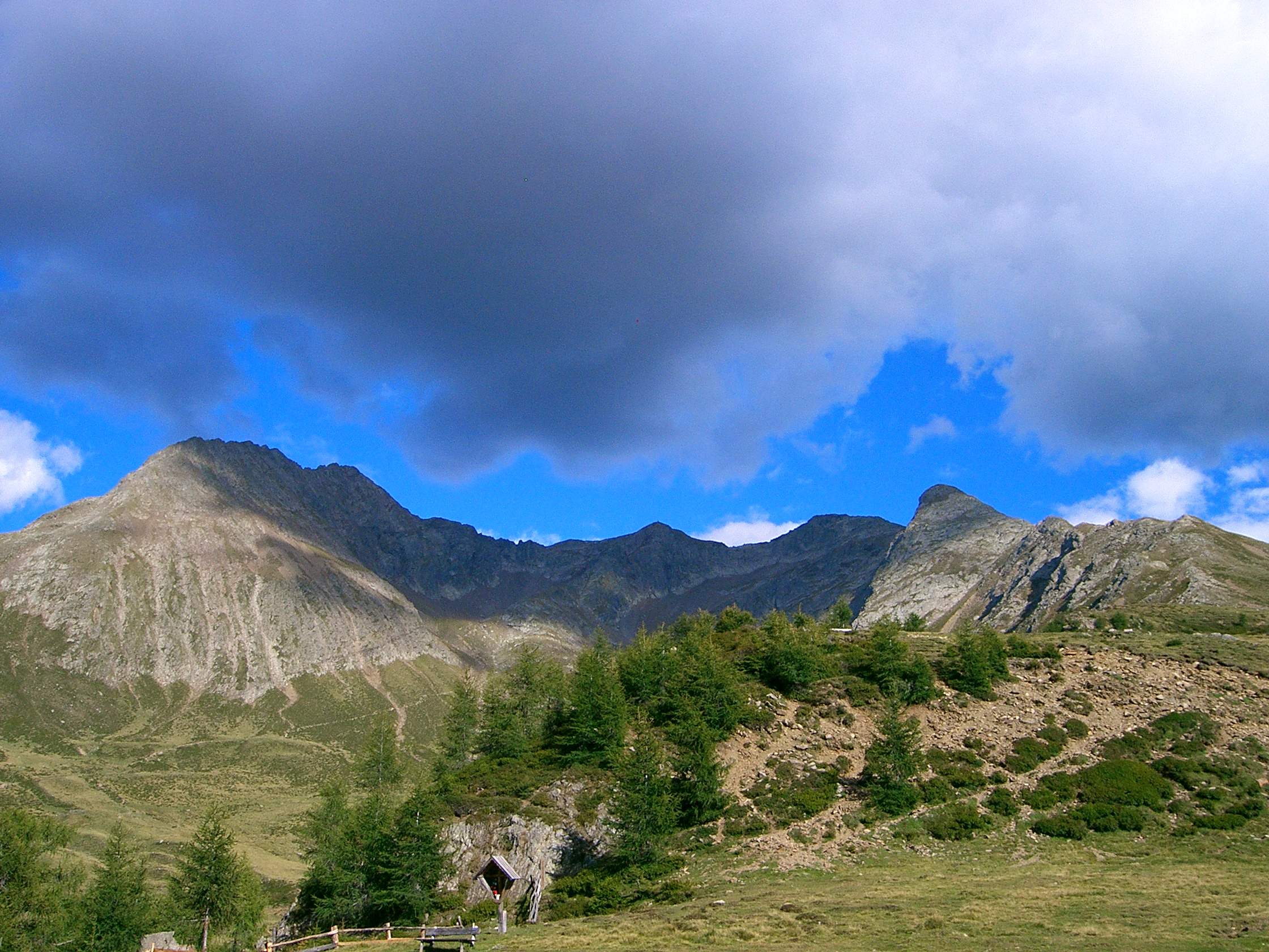 Die Hirzerspitze (links, 2781m) von Westen. Rechts ist der Gipfel des Hönig, 2623m, zu sehen.